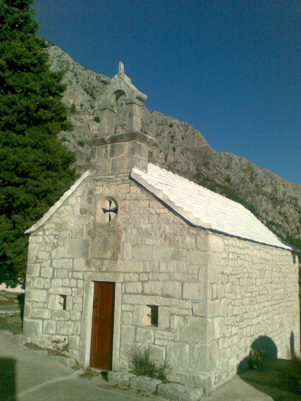 Lokva Rogoznica